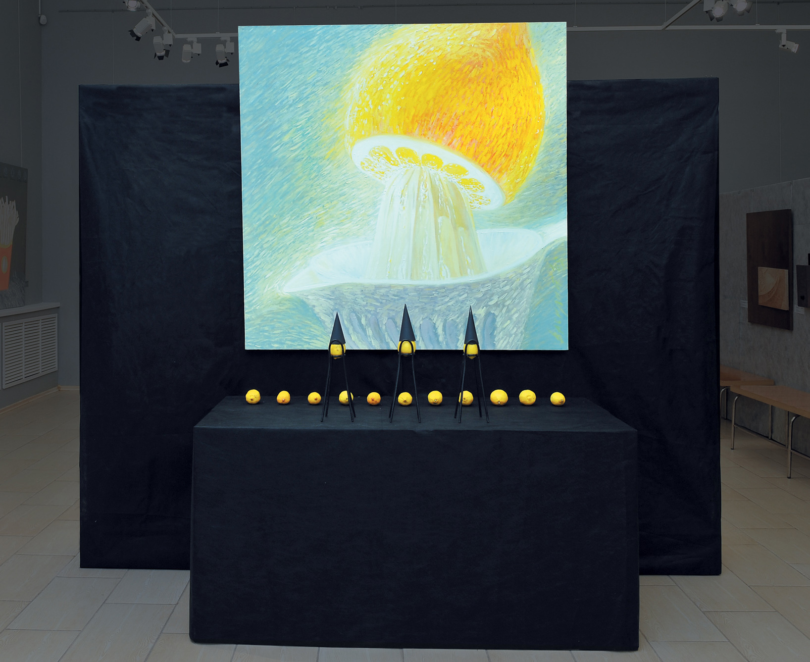 УТРЕННЯЯ КАЗНЬ. Инсталляция. Холст, масло, металл, ткань, цитрусовые, 300Х270Х80 см. 2010 г